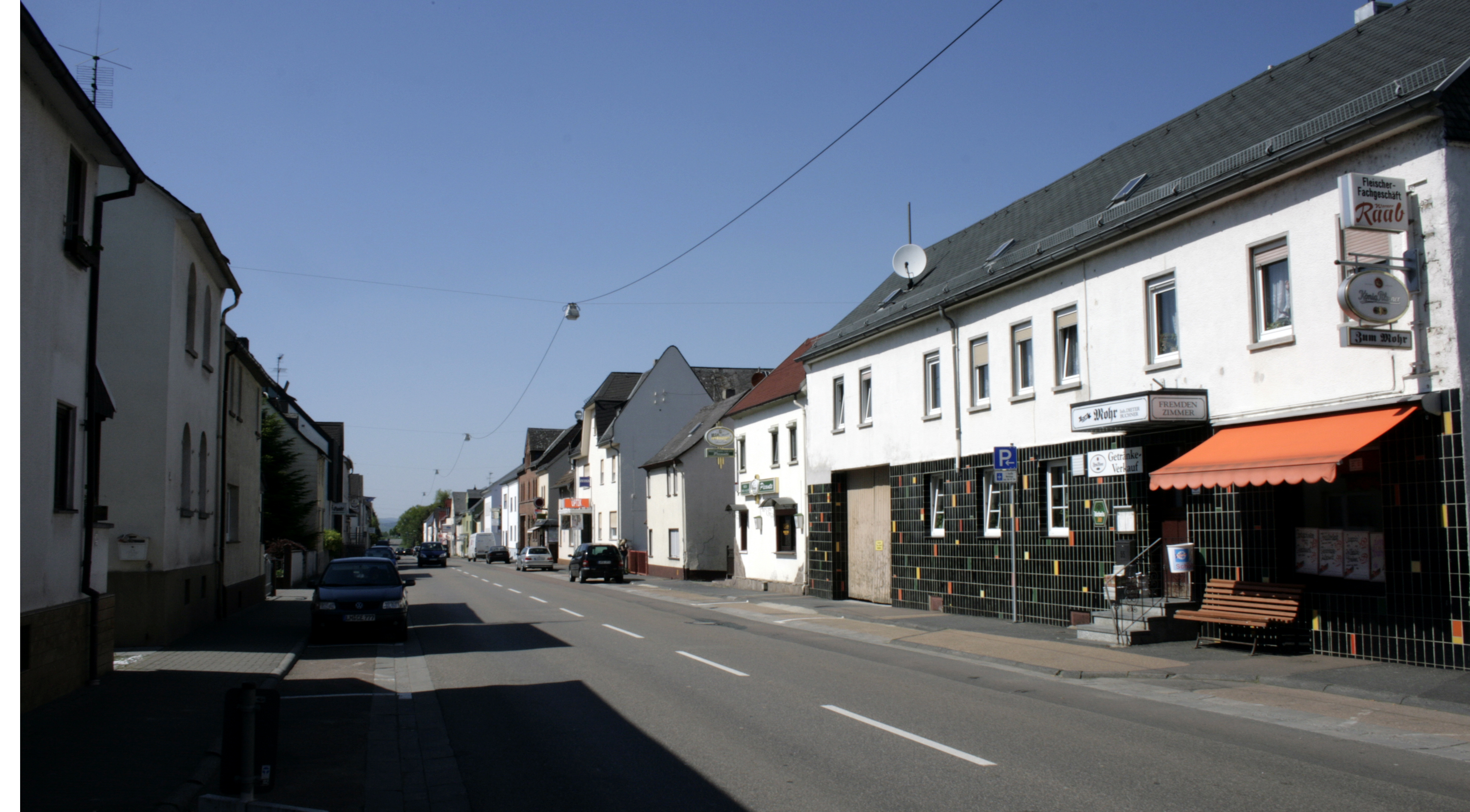 Hauptstraße in Linter, Deutschland